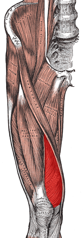 Vastus medialis muscle